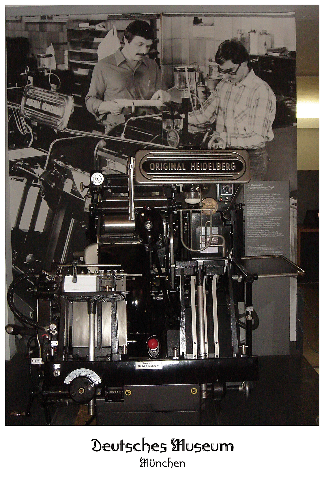 Modell T Platen (Tiegel), (1950 – 1985), präsentiert im Deutschen Museum, München